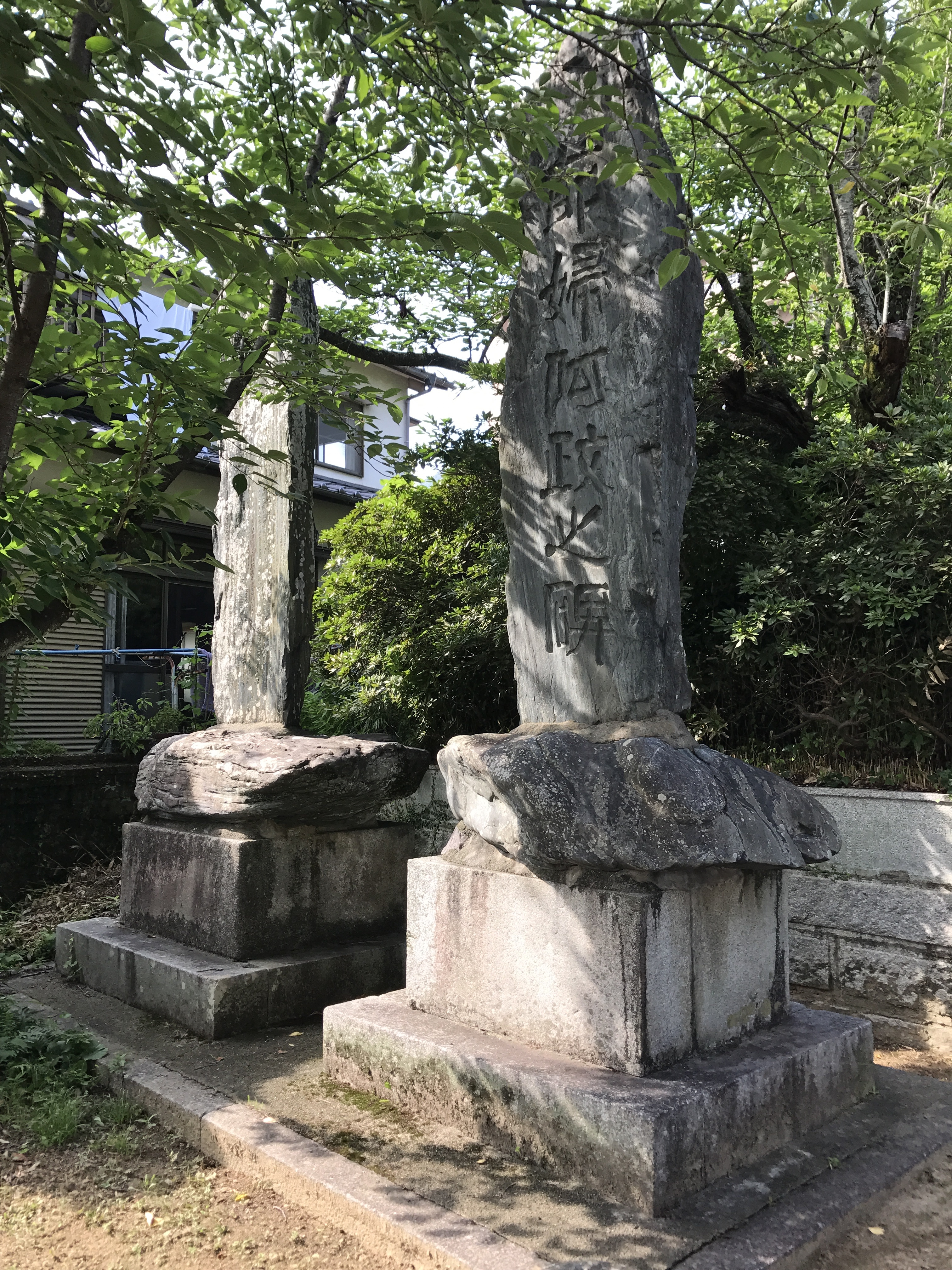 須賀神社境内の節婦阿政之碑